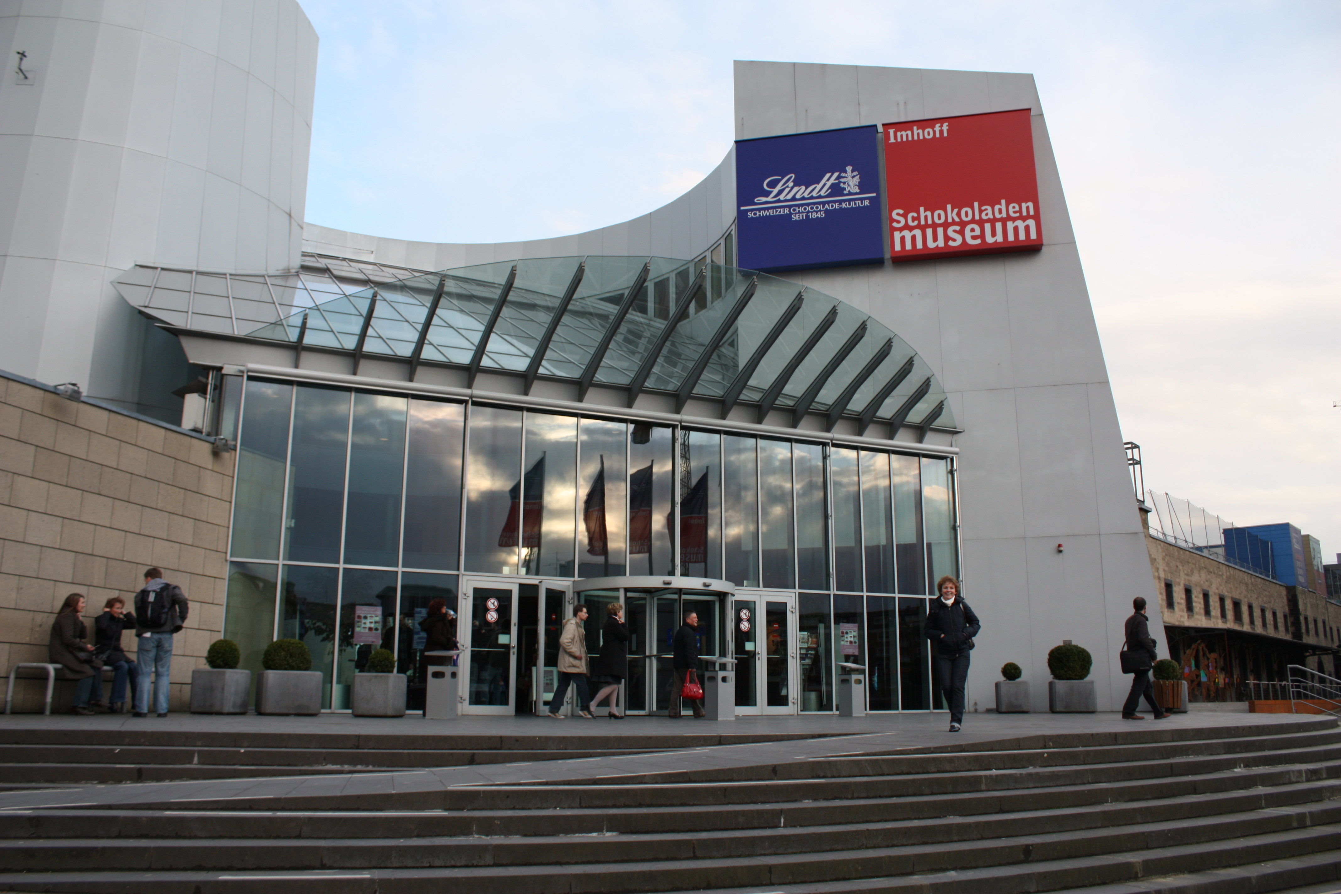 Köln, März 2009